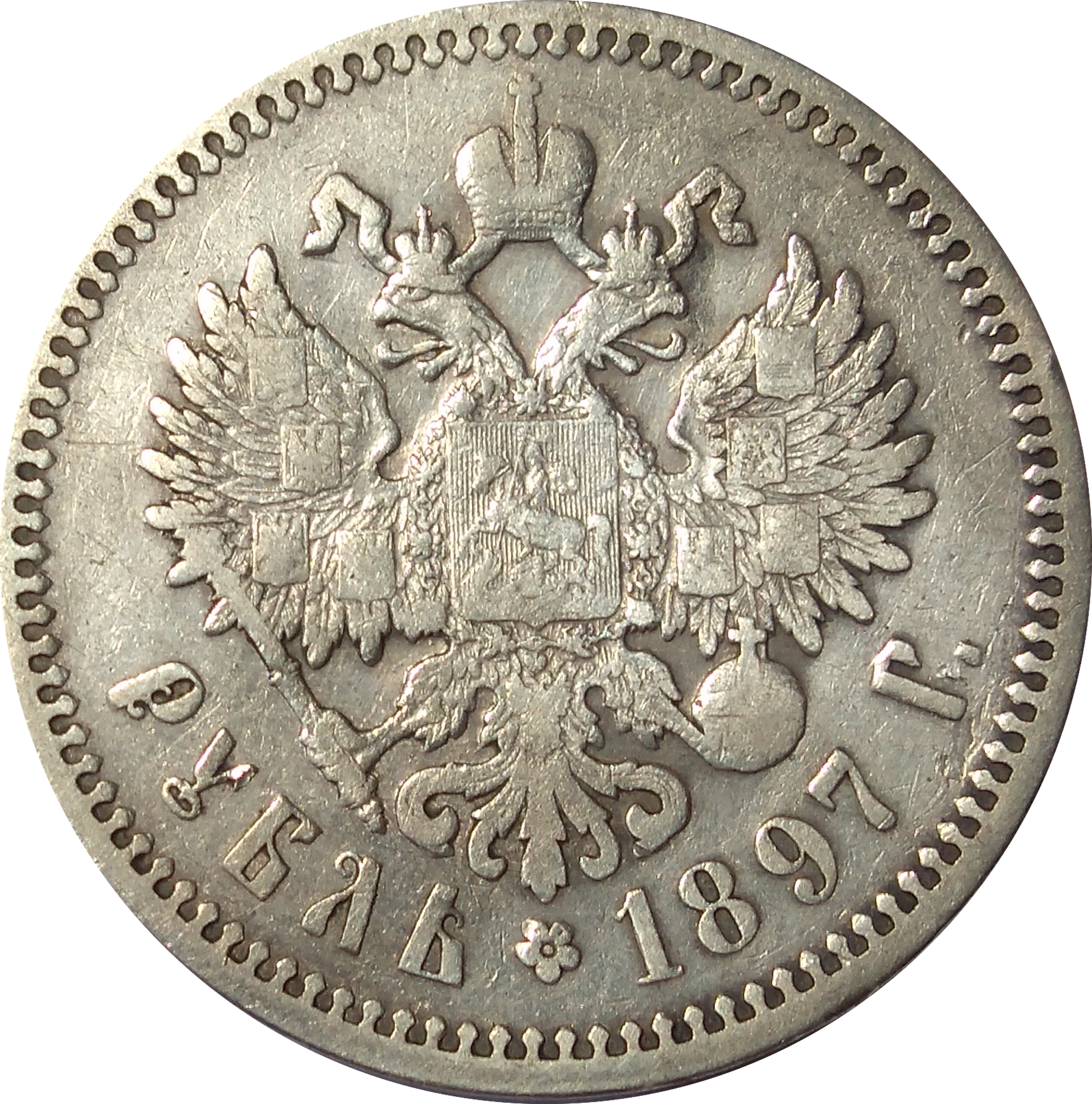 Reverso de una moneda de 1 rublo de 1897. Se puede ver el Escudo del Imperio Ruso.